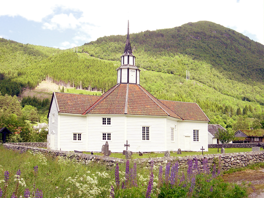 Stordal and the Stordal gamle kirke